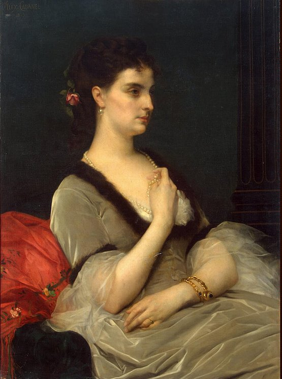 Portrait de la Comtesse Elizabeth Vorontsova-Dashkova par Alexandre Cabanel